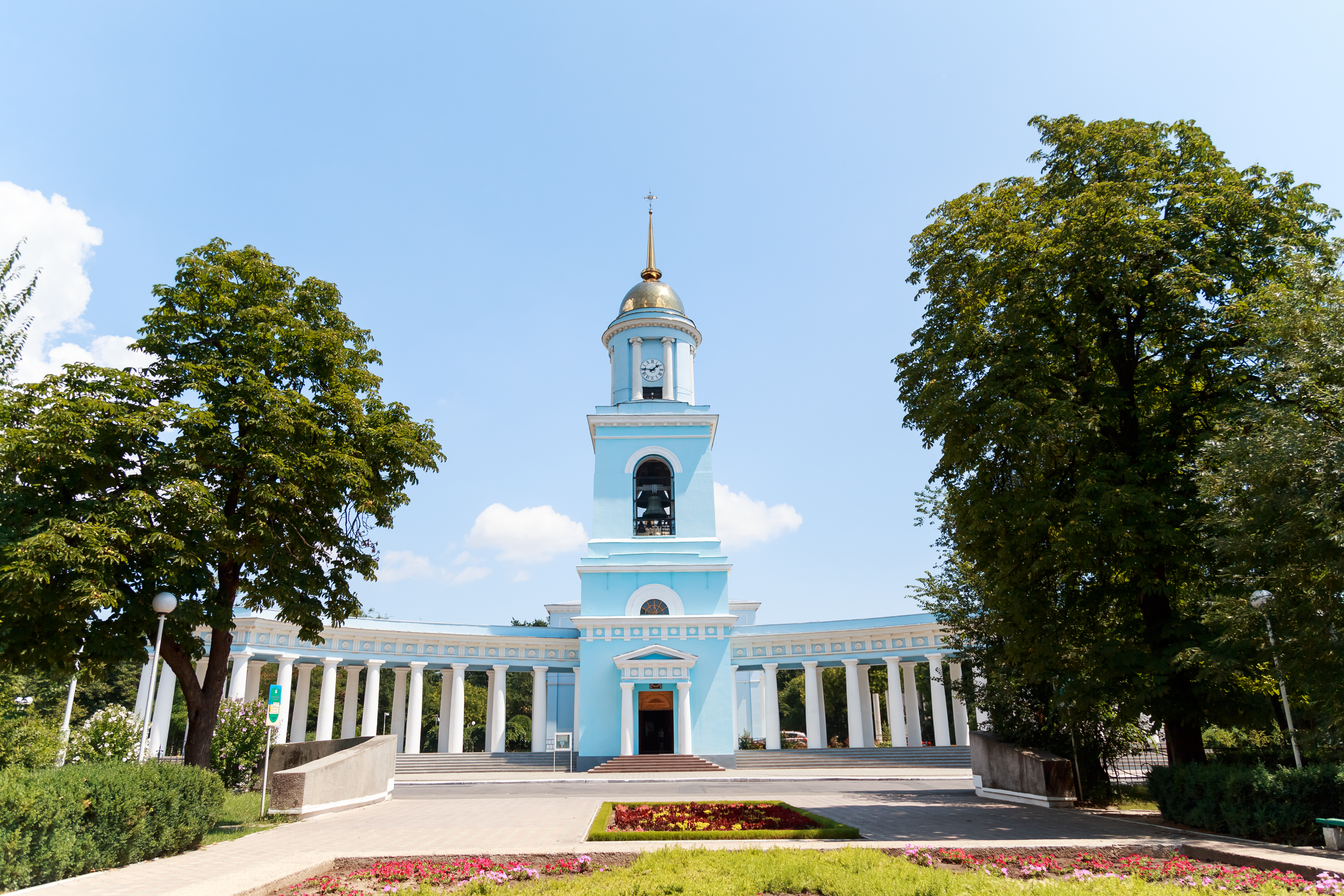 Кафедральний собор Покрова Пресвятої Богородиці і придільна церква Св. Миколая, Ізмаїл, пр-т Суворова, 31